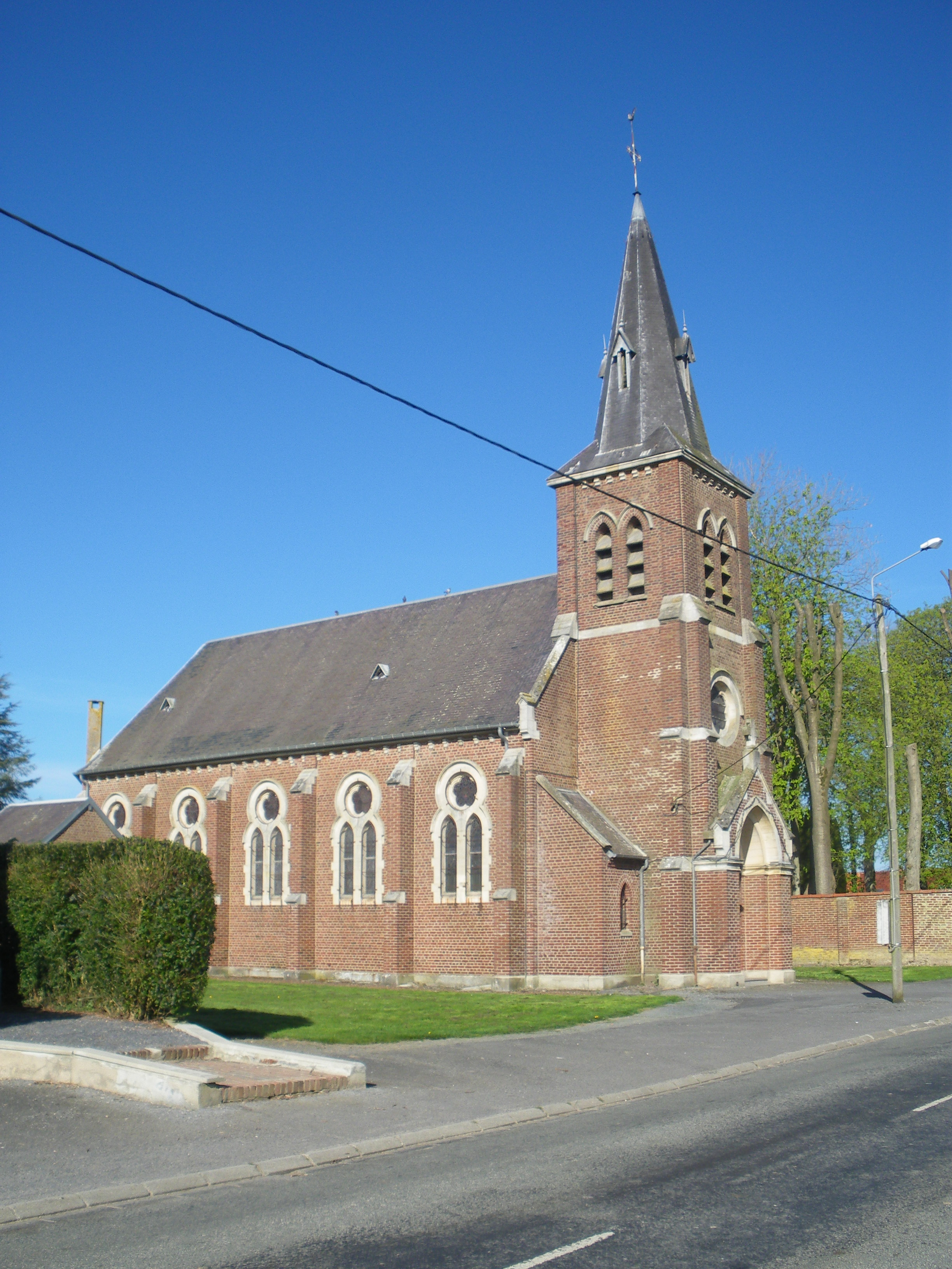 Vue de l'église Saint-Martin de Gommecourt (62).